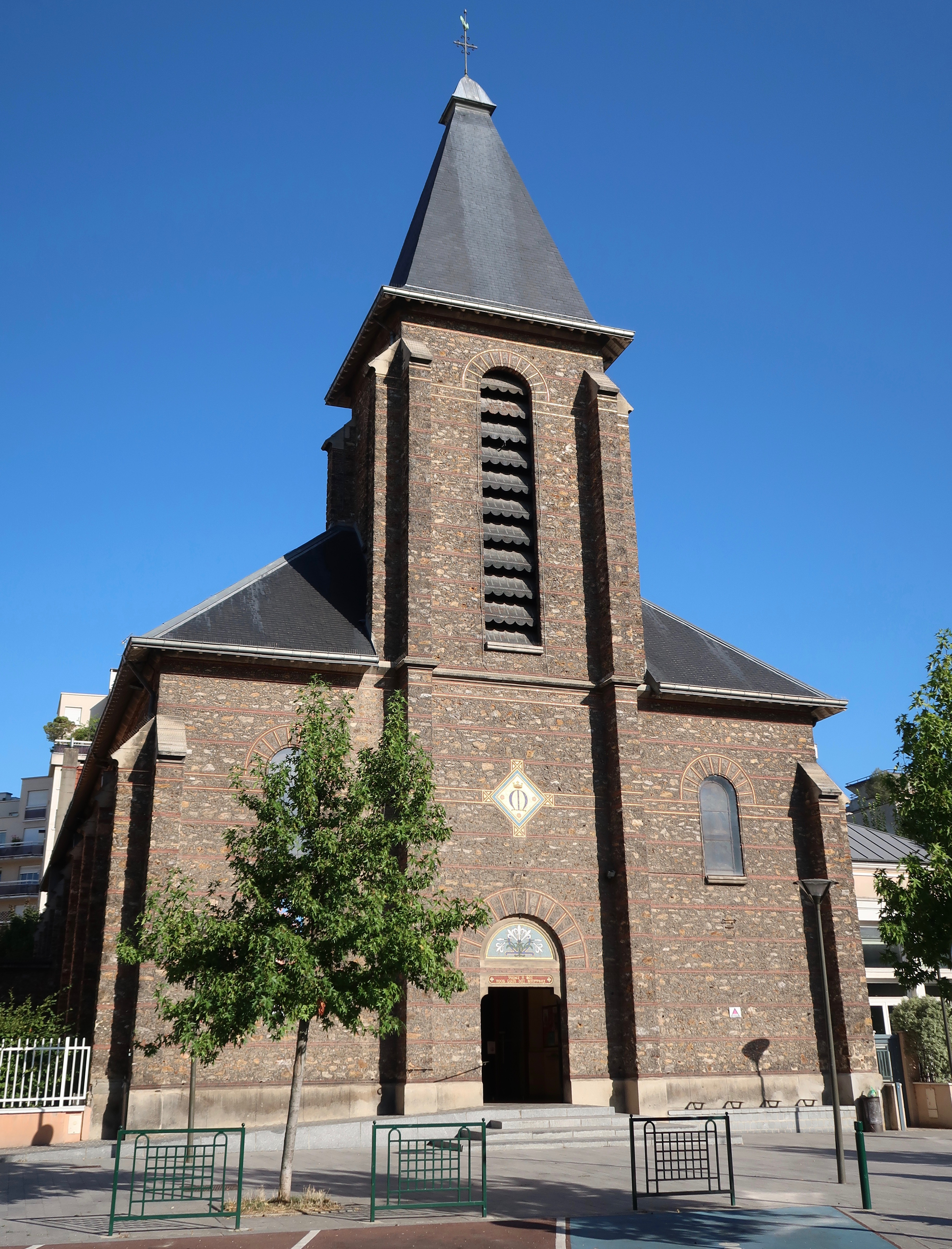 Église du Cœur-Immaculé-de-Marie de Suresnes (Hauts-de-Seine).